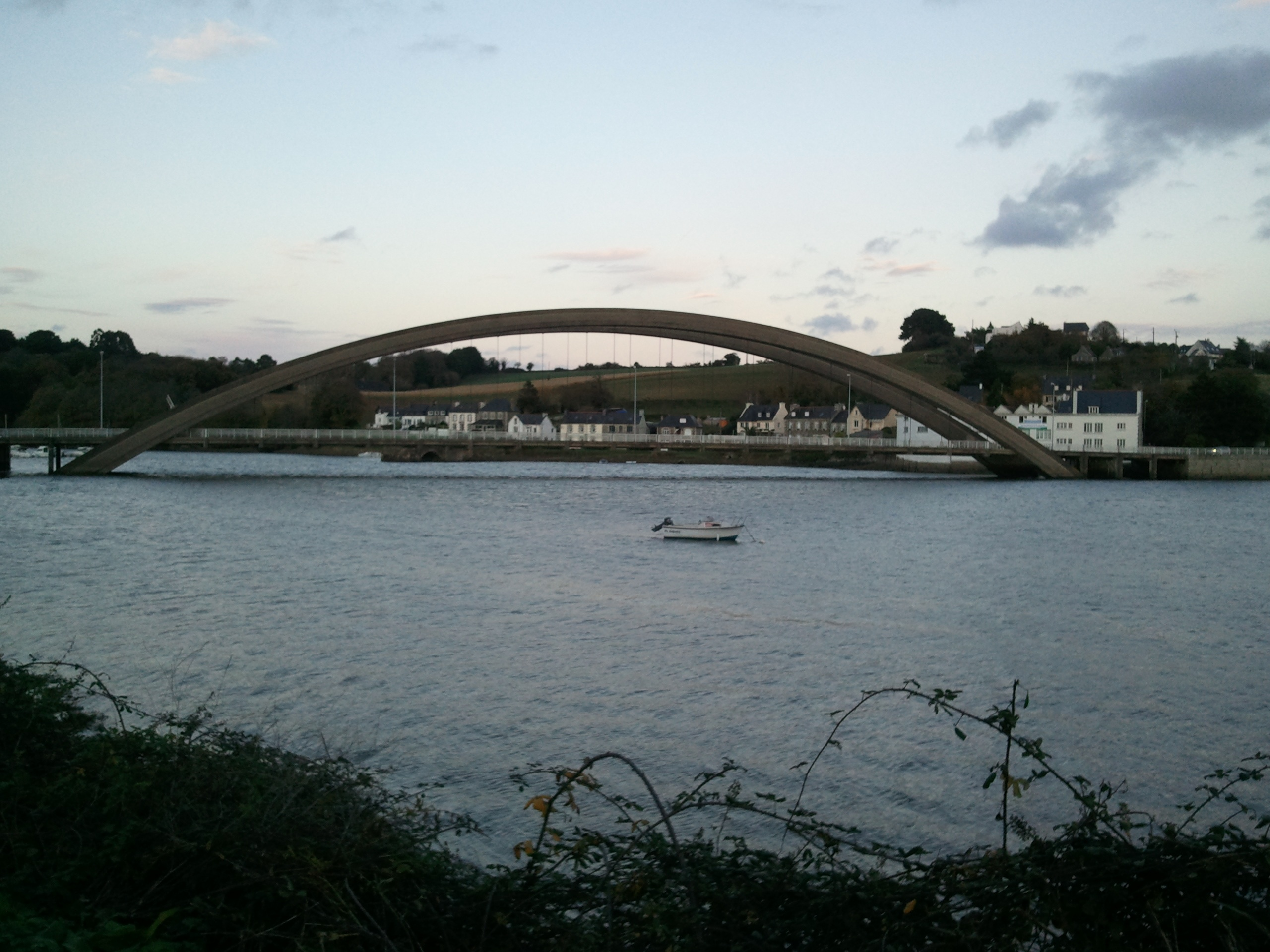 Pont Canada, 1954, Tréguier, côtes d'armor, Bretagne, France. Vue générale.